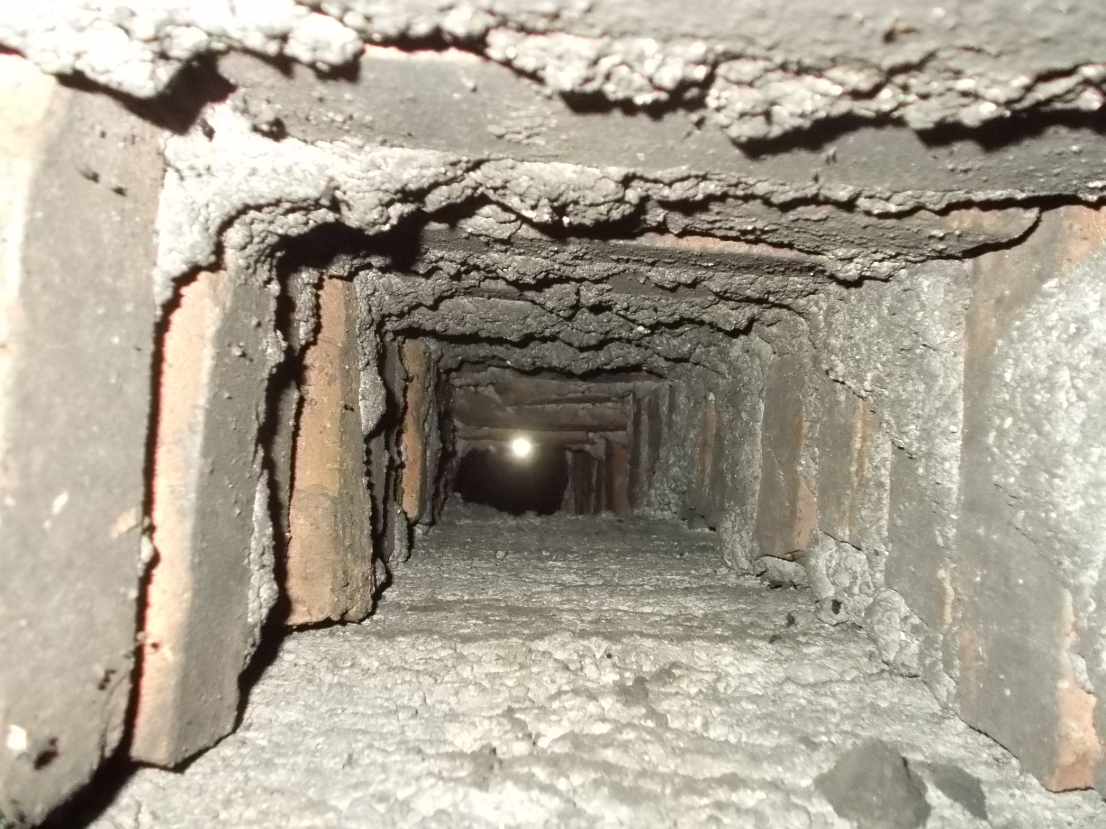 Inneres eines (etwas krummen) Hausschornsteins für Holz- oder Kohlefeuerung